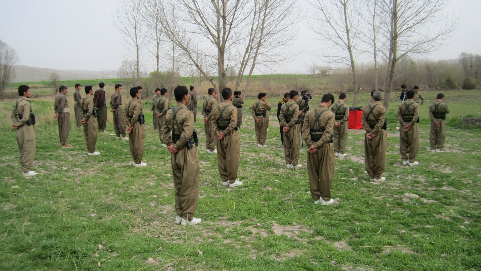 YPG